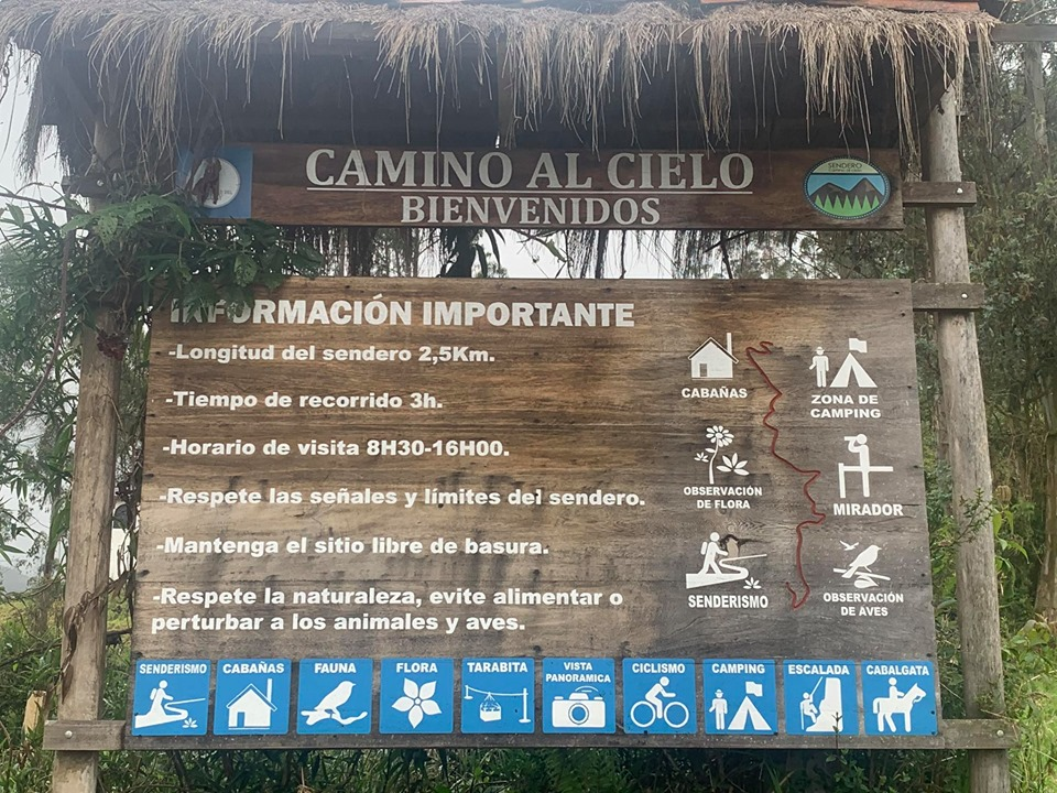 Letrero en la entrada Camino al Cielo que brinda información acerca del sendero